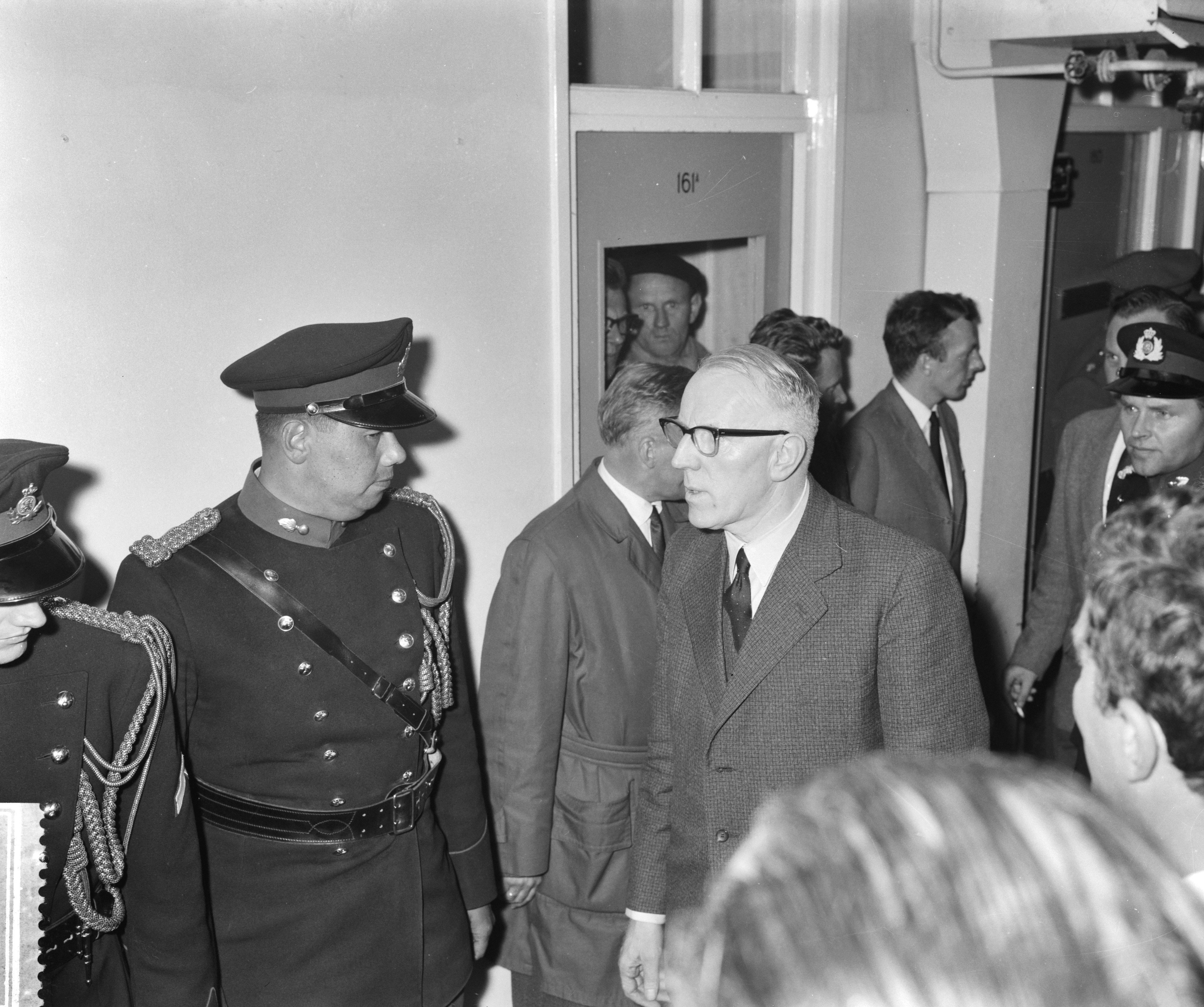 Collectie / Archief : Fotocollectie Anefo Reportage / Serie : [ onbekend ] Beschrijving : Vertrek van mevrouw Golub naar Moskou. Aankomst mr. H.R. de Zaaijer Datum : 9 oktober 1961 Locatie : Moskou Trefwoorden : aankomsten, vertrekken Fotograaf : Rossem, Wim van / Anefo Auteursrechthebbende : Nationaal Archief Materiaalsoort : Negatief (zwart/wit) Nummer archiefinventaris : bekijk toegang 2.24.01.04 Bestanddeelnummer : 913-0267